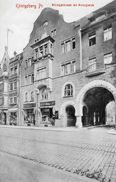 Königsberg